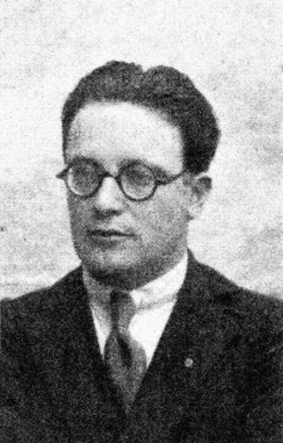 Bruno Migliorini (1896 - 1975) - itala esperantisto kaj lingvisto